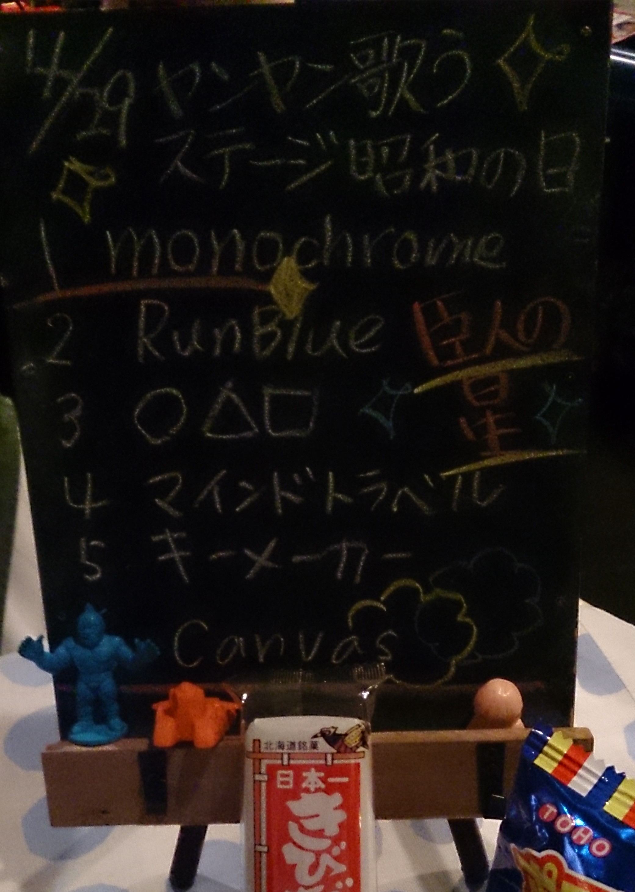 amiinaセトリボード(20150429(2))